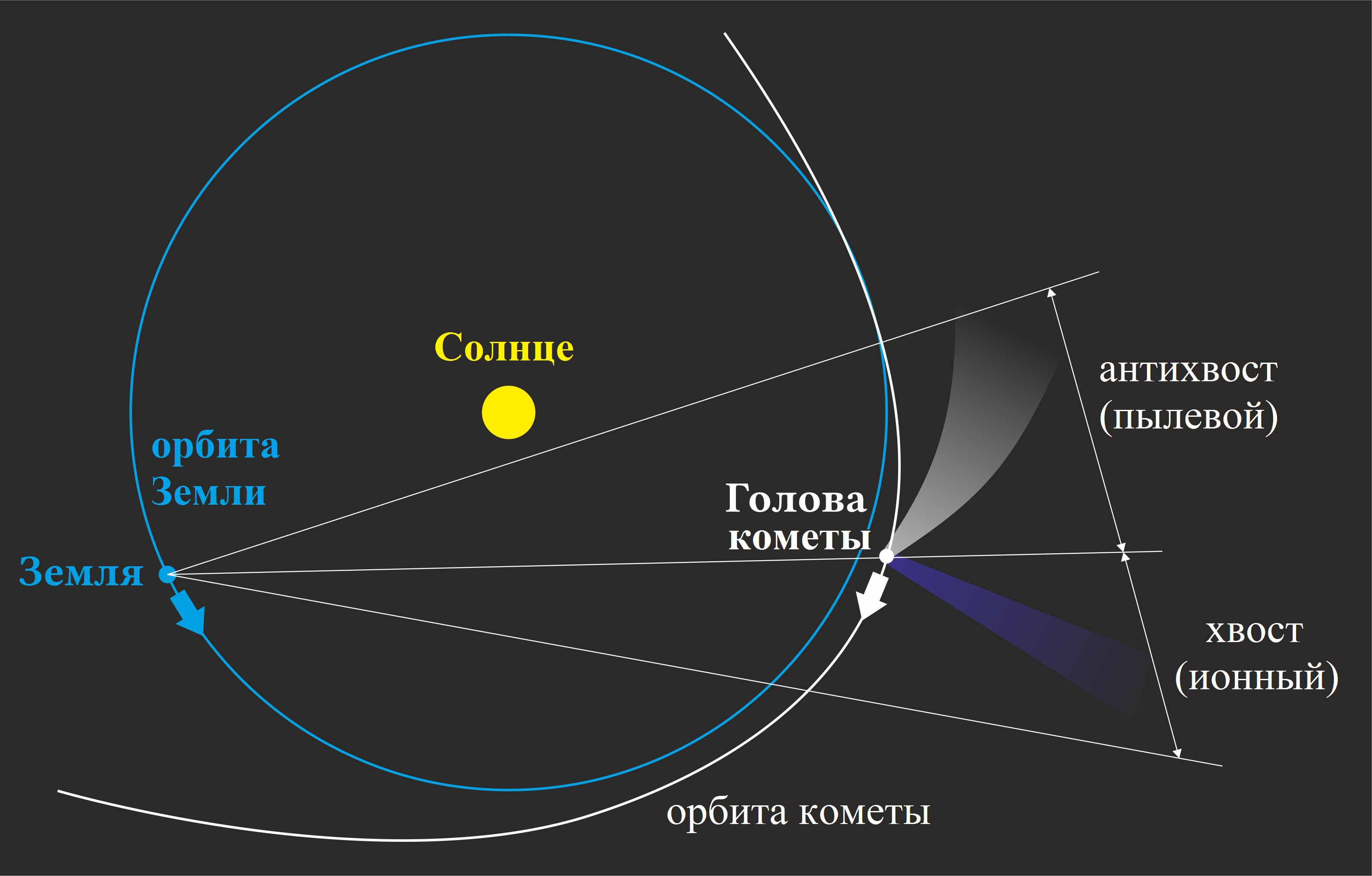 Схема хвостов кометы